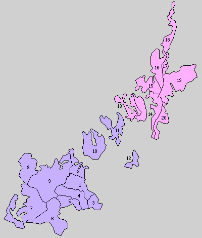 長崎県南松浦郡の町村制時点の町村。